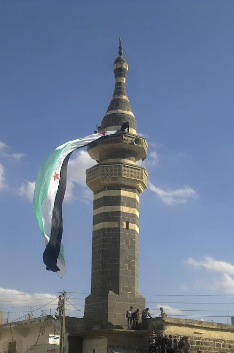 ريف درعا صور للمسجد العمري في مدينة الشيخ مسكن